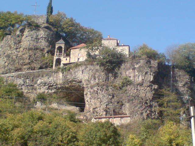 ქ.ჭიათურა.მღვიმევის დედათა მონასტერი